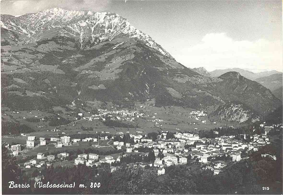 LC Barzio m,800 - Valsassina